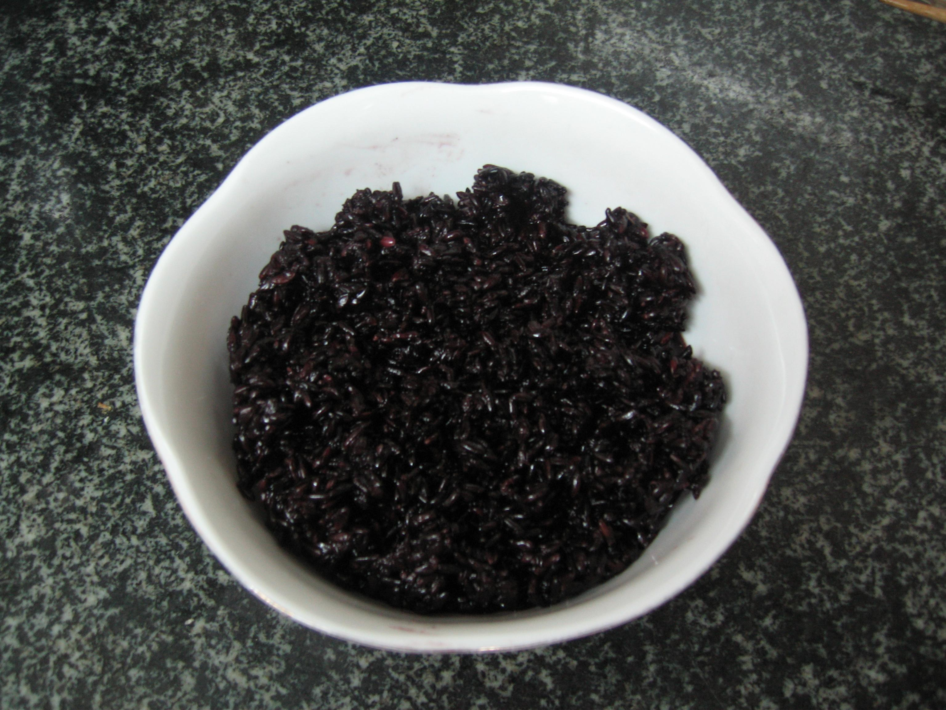 Rượu nếp cẩm. Ảnh này do người truyền lên chụp.